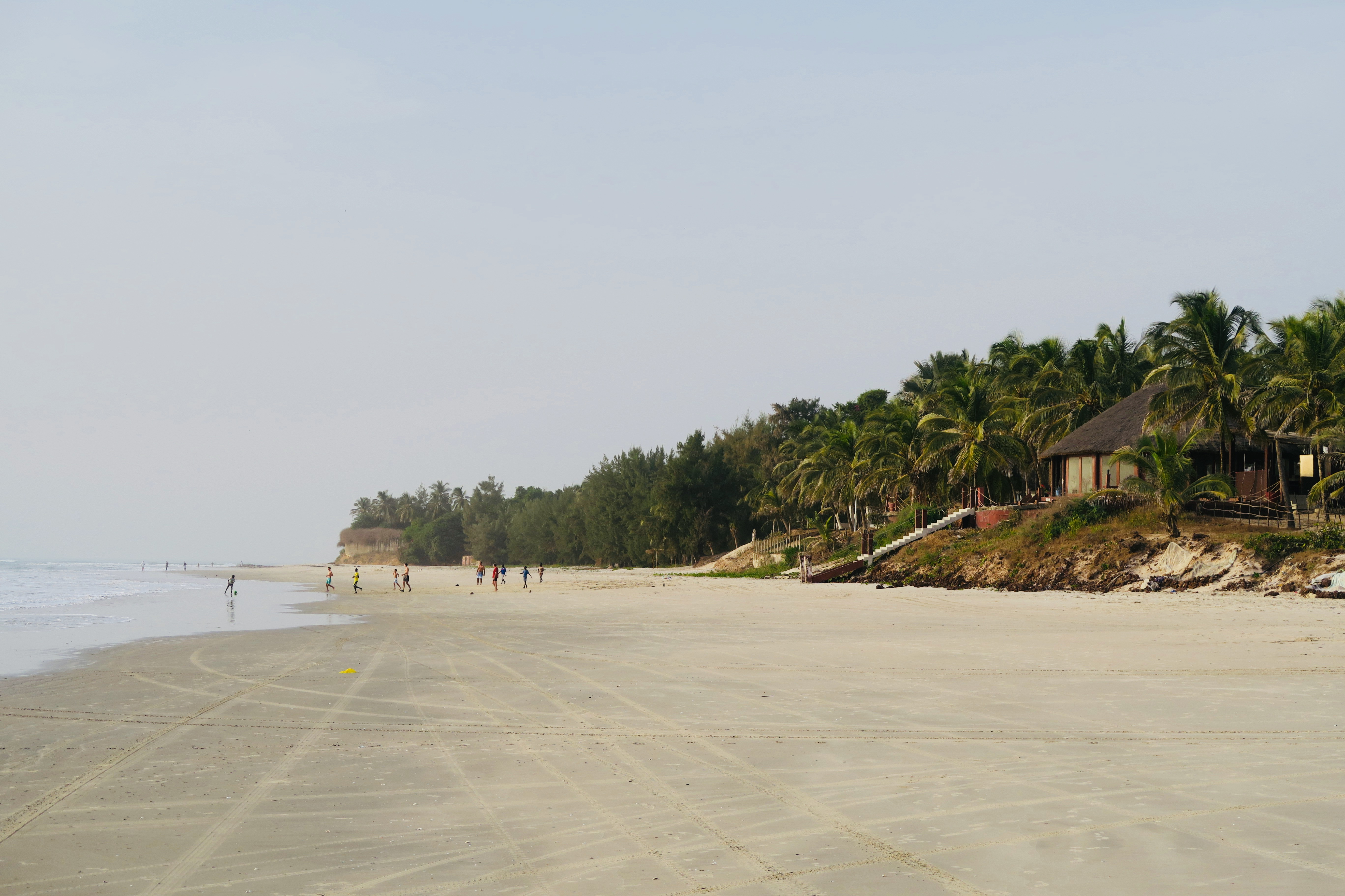 Plage entre le Cap Skirring et Kafountine (Csamance- Sénégal) en saison sèche - décembre 2017